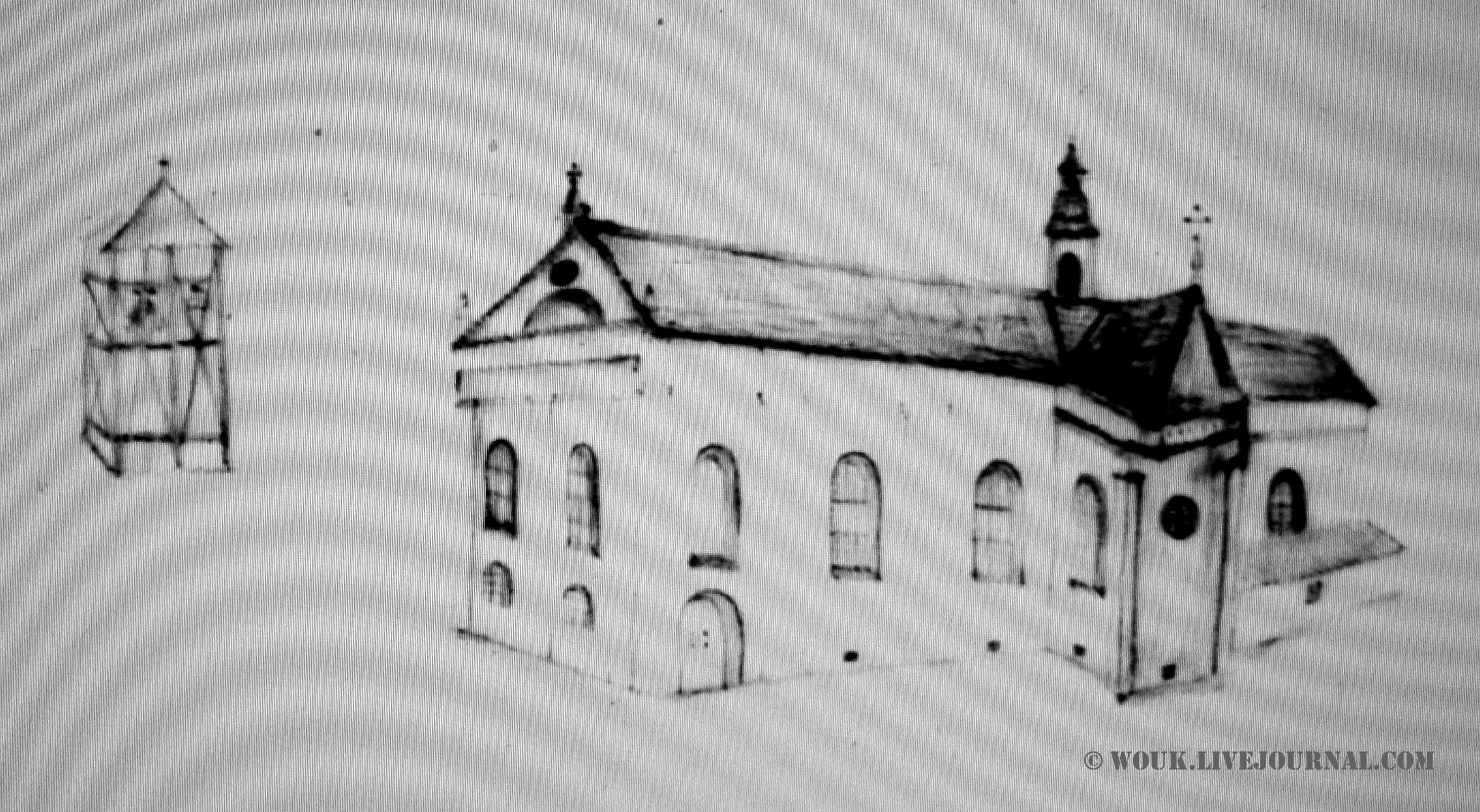 Беларуская (тарашкевіца): Нясьвіж (Niaśviž), Анёльская гара (Aniolskaja hara). Касьцёл Сьвятога Крыжа і кляштар бэнэдыктынаў па руйнаваньні вежы-званіцы